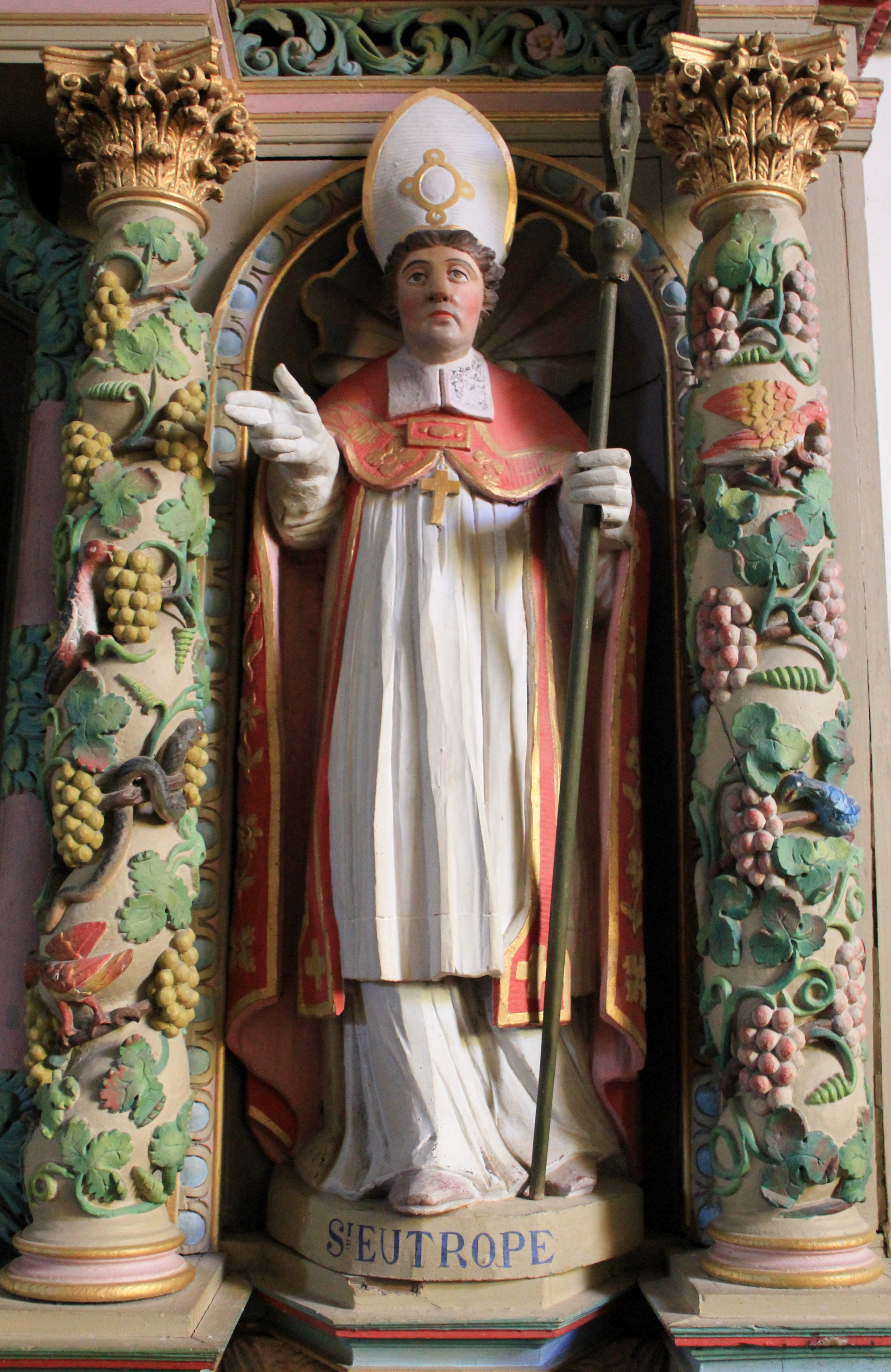 Église Sainte-Croix (La Croix-Helléan) : retable sud, Saint-Eutrope